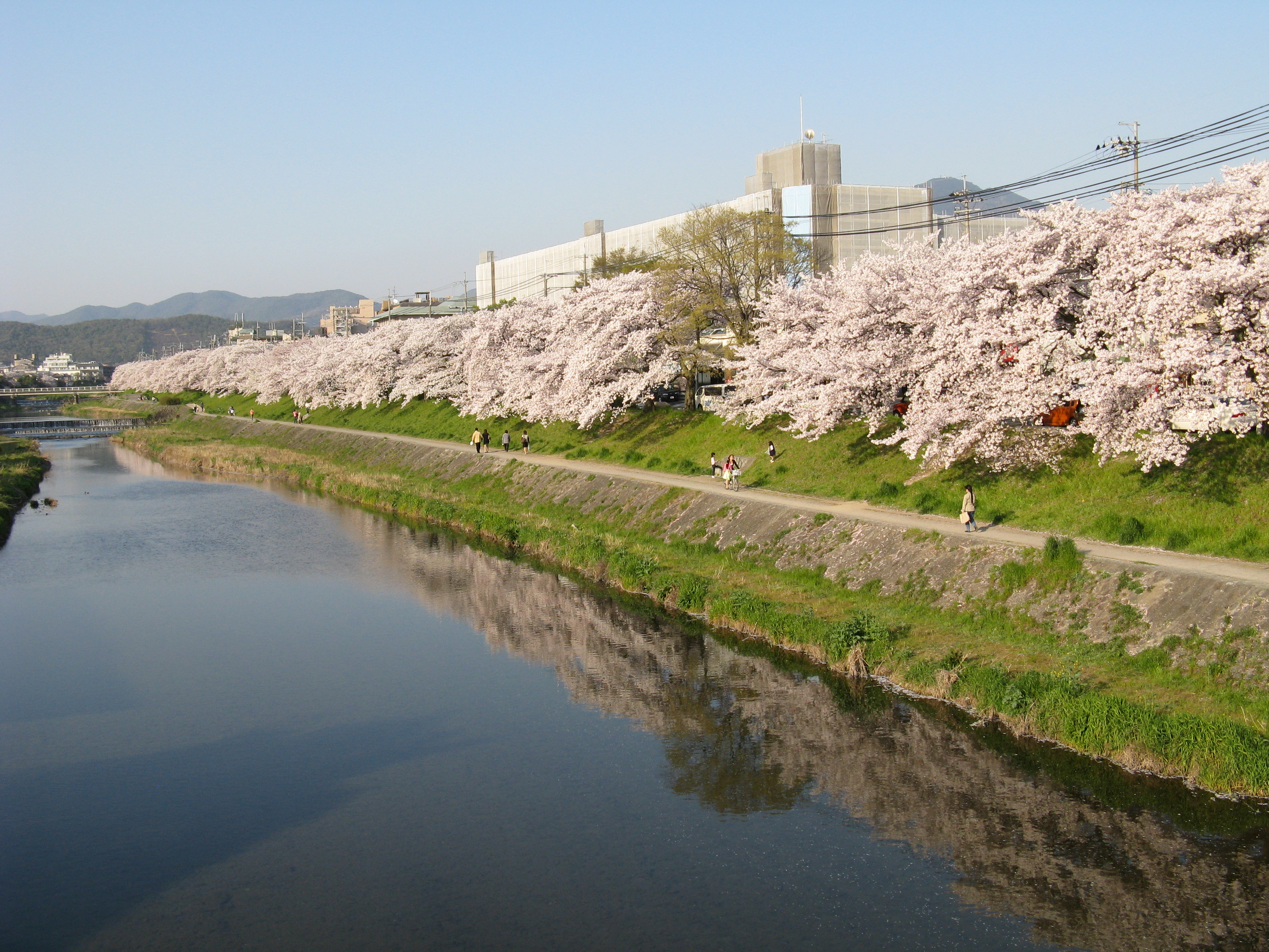 高野川 （御蔭通の橋上より撮影）